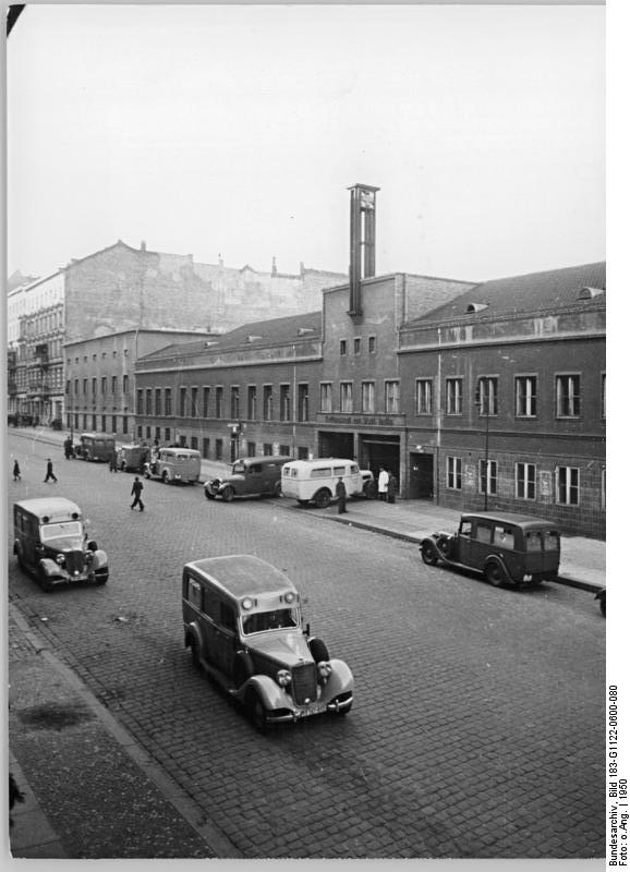 Berlin, Marienburger Straße, Rettungsamt, Krankenwagen Zentralbild Das Rettungsamt in Berlin, Marienburger Straße. UBz: die Außenansicht des Rettungsamtes mit den aus- und einfahrenden Krankentransportwagen. Aufnahme 1950.